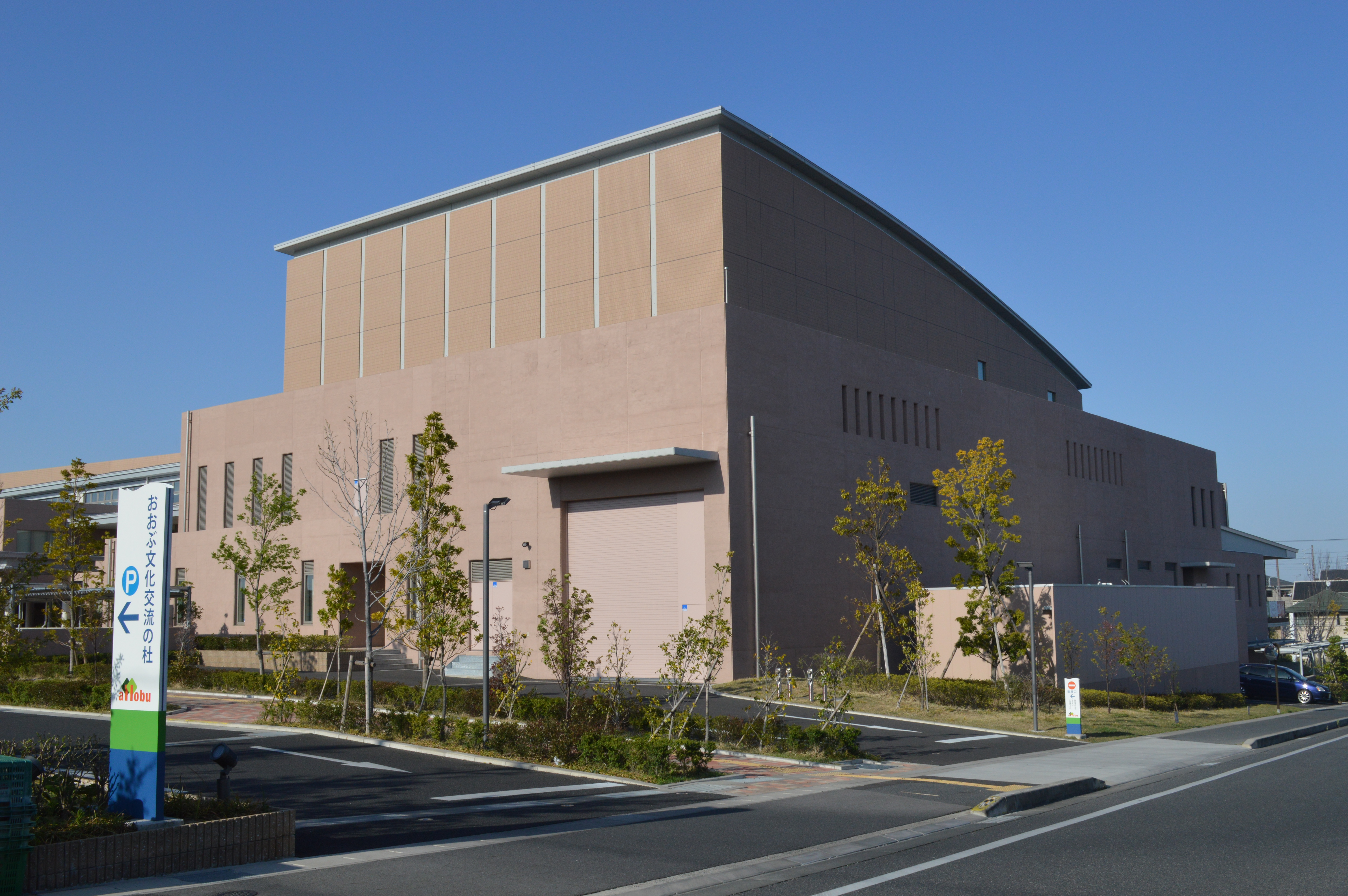 おおぶ文化交流の杜 愛知県大府市